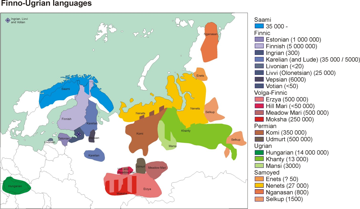 ուգրո-ֆիննական